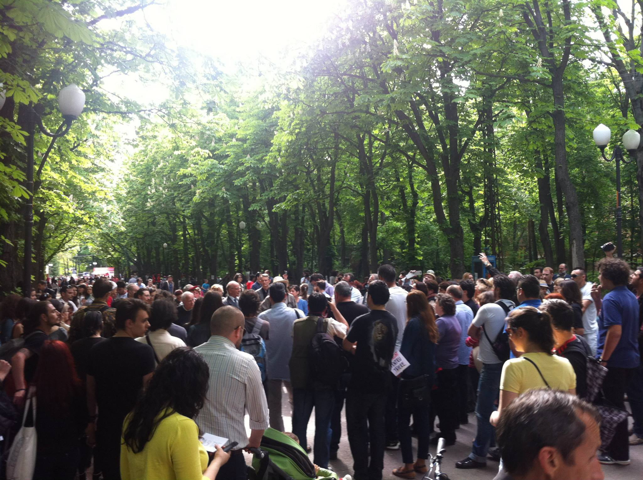 Marcari silvice Parcul Expozitiei 2014, Protest